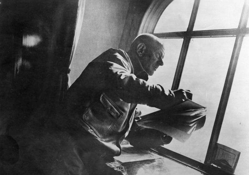 Ludwig Dettmann Scherl: Der grosse Transozeanflug des "Graf Zeppelin". Das deutsche Riesenluftschiff "Graf Zeppelin" ist nach zweimaliger erfolgreicher Überquerung des Ozeans glücklich in seinen Heimathafen zurückgekehrt. Unsere Bilder zeigen Aufnahmen, die unser an Bord befindlicher Bildberichterstatter aufgenommen hat.- Der Spezialzeichner des Scherlverlages, Professor Dettmann, der das künstlerische Moment der Atlantiküberquerung im Passagierluftschiff festhielt, bei seiner Arbeit am Kabinenfenster des "Graf Zeppelin". Abgebildete Personen: Dettmann, Ludwig Prof. Dr.: Maler, Deutschland (GND 116086483)